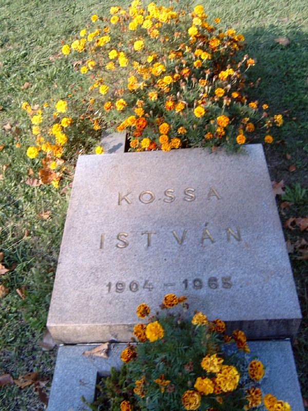 Kossa István (1904-1965) kommunista politikus, Nagy Imre nemzeti kormányának pénzügyminisztere, miniszter, MSzMP KB tag sírja Budapesten. Kerepesi temető: Mm. B. 10.